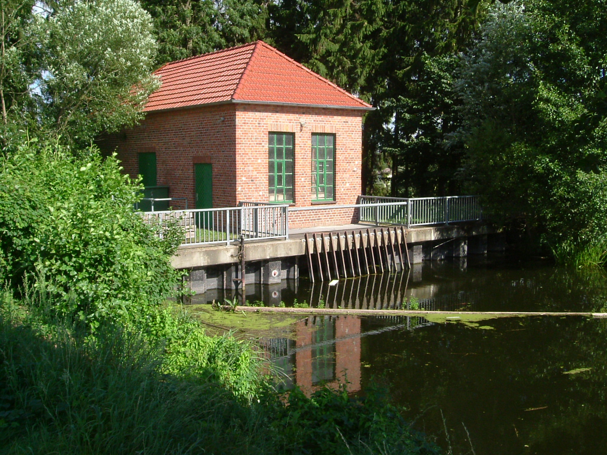 Wasserkraftwerk Zülow Wasserschloss (Wasserzulauf)